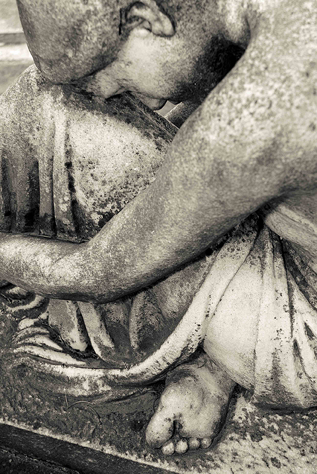 Detail der Skulptur Die Trauernde von Margarete Depner auf dem Zentralfriedhof von Hermannstadt/Sibiu